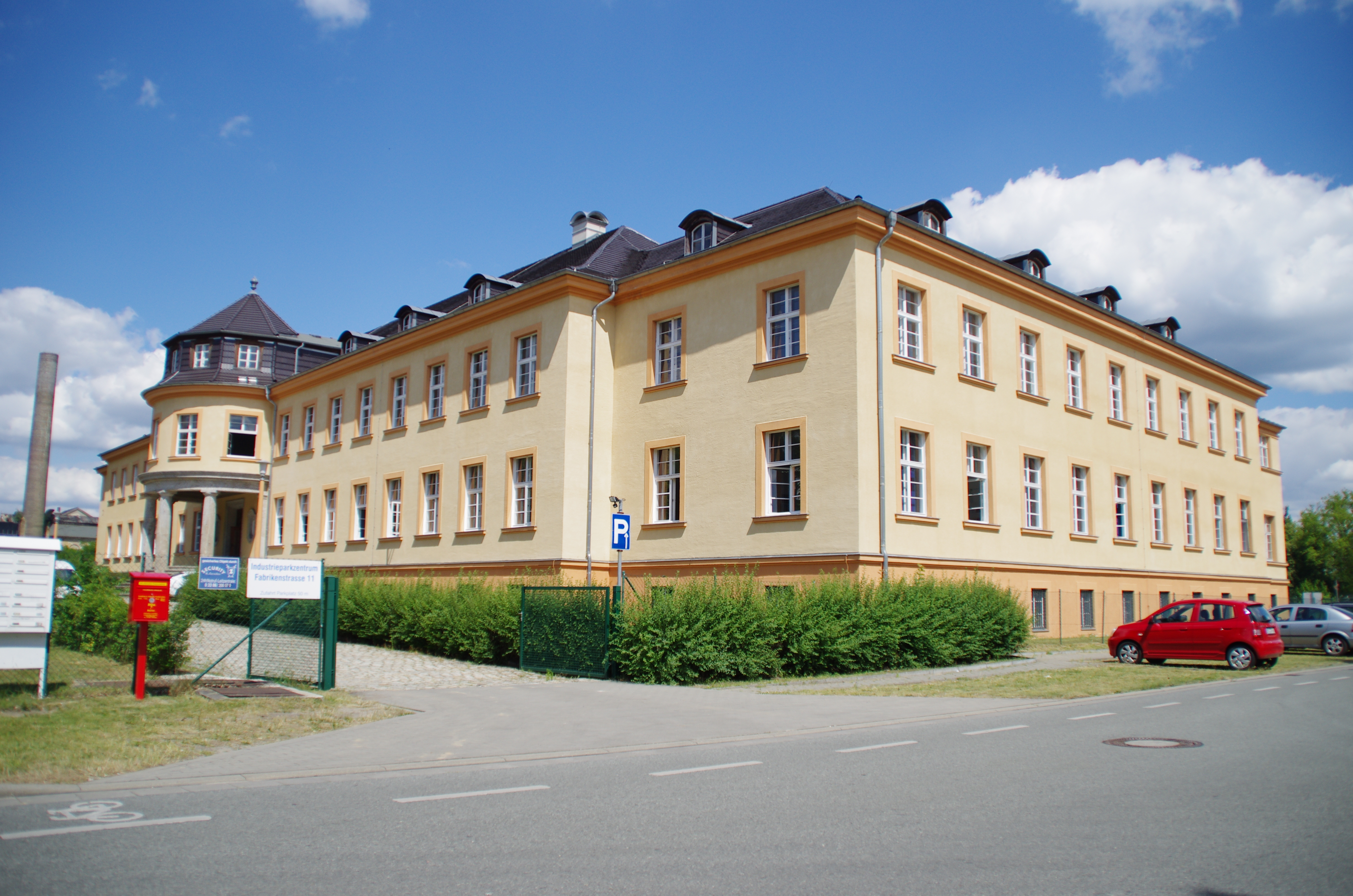 Premnitz in Brandenburg. Das Haus in der Fabrikenstraße steht unter Denkmalschutz.